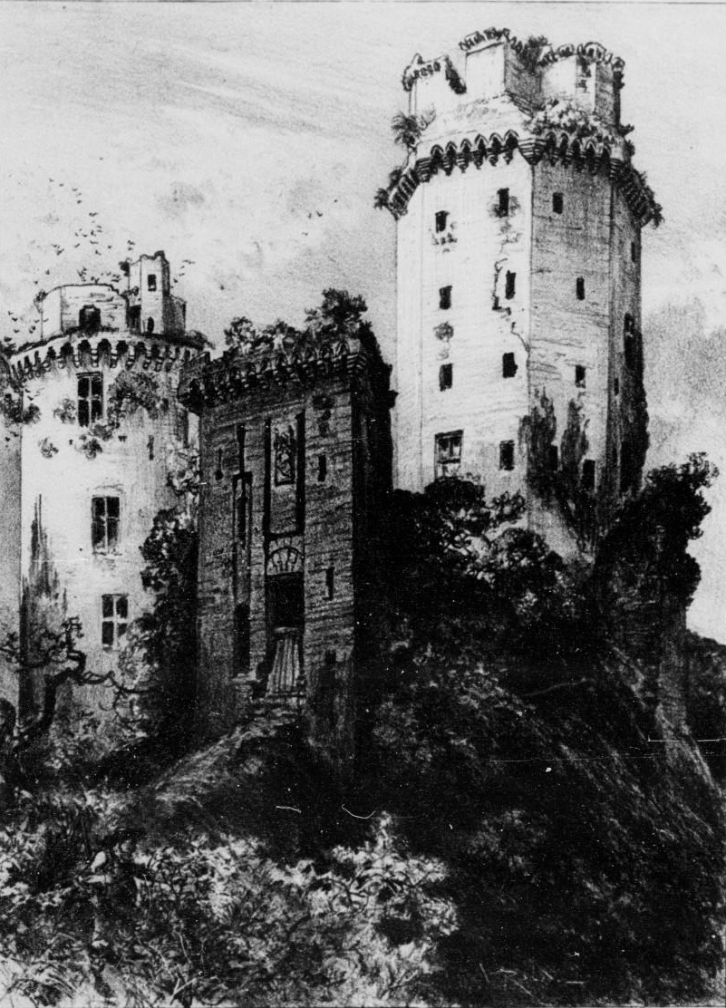 La Tour d'Elven (litographie d'Albert Robida parue dans " La vieille France. Bretagne" vers 1900)